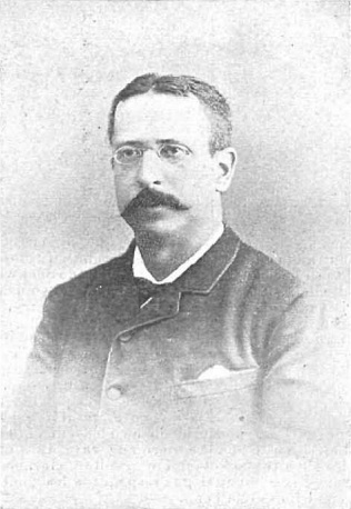 Francisco Lastres, abogado de Mr. Henry Sackwille. Fotografía de Manuel Alviach.